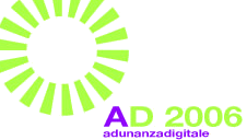 Logo di Adunanza digitale realizzato da Hackaserta 81100, Licenza d'uso GFDL